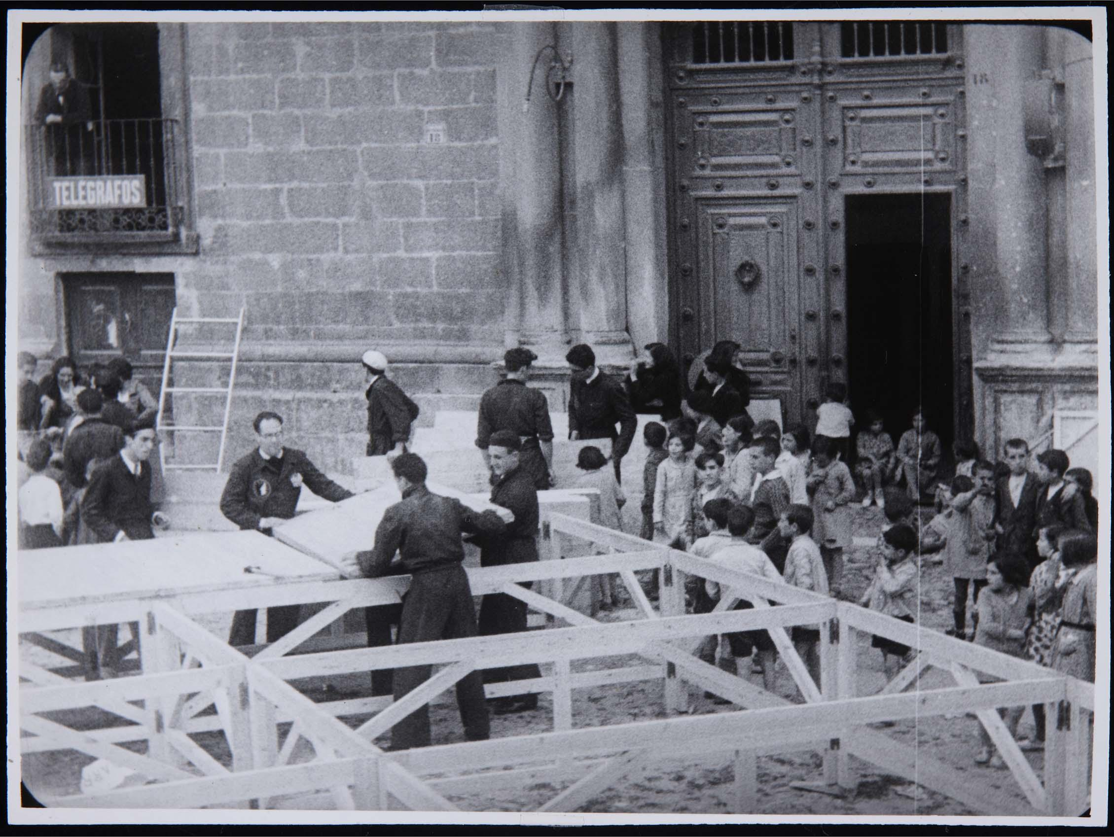 Montaje del escenario por los componentes de La Barraca para la representación de «La guarda cuidadosa», de Miguel de Cervantes (Almazán, Soria) (julio de 1932). Fotografía anónima. Colección del Museo Nacional Centro de Arte Reina Sofía, Madrid, España